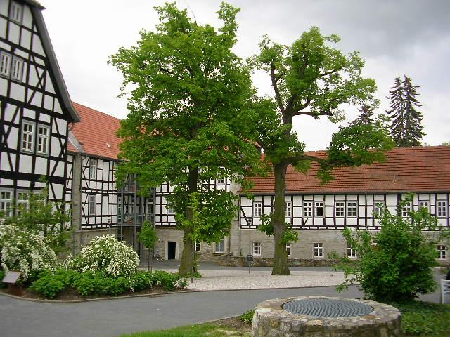 Gut Volkenroda bei Körner in Thüringen